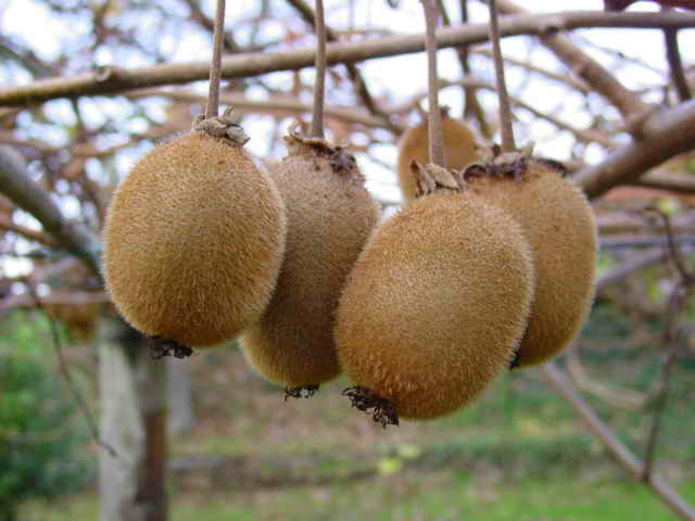 Foto tirada cunha Nikon E8800 en Mandaio - Oza (Betanzos)